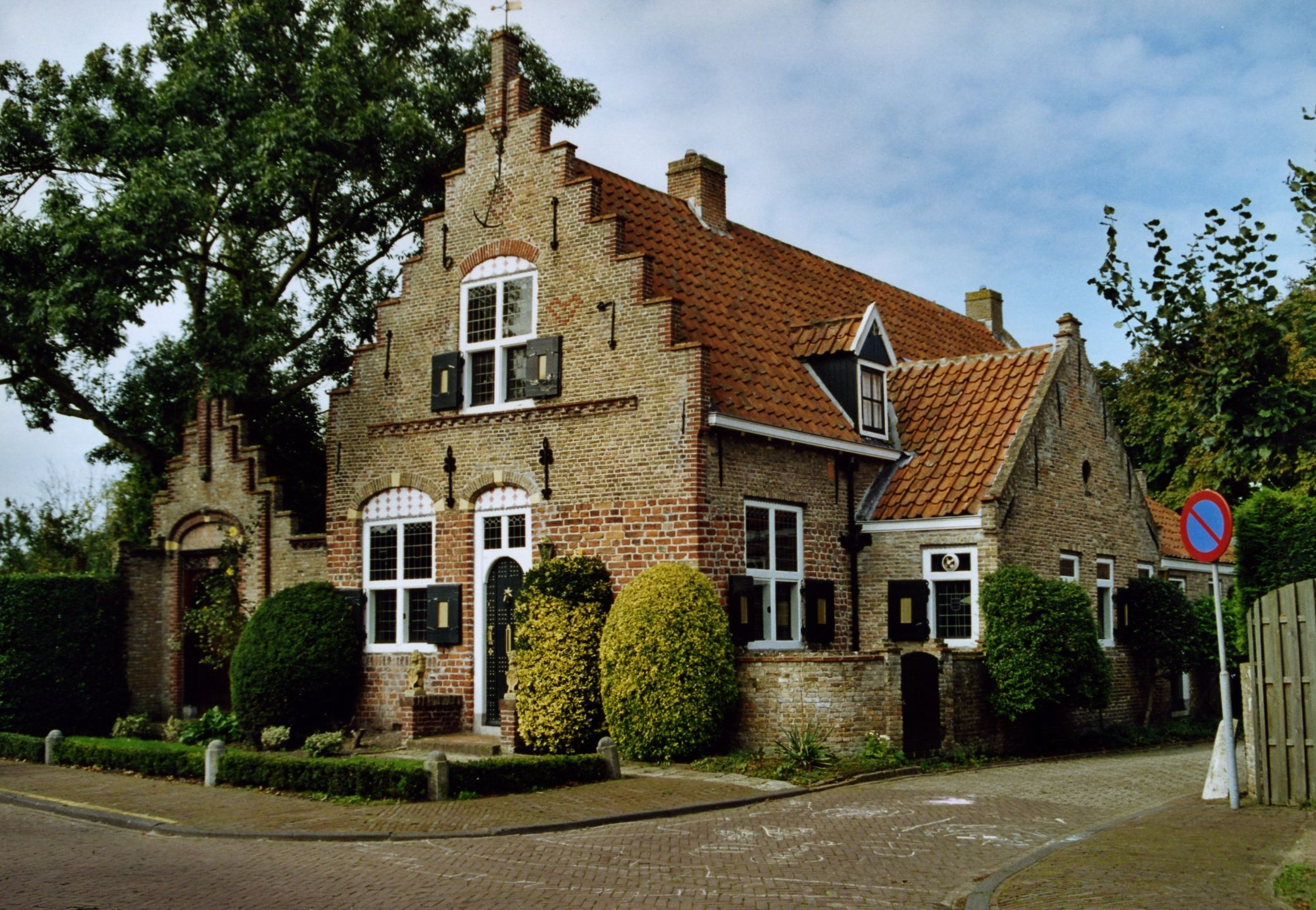 Jachtslot 't Ancker te Burgh-Haamstede.